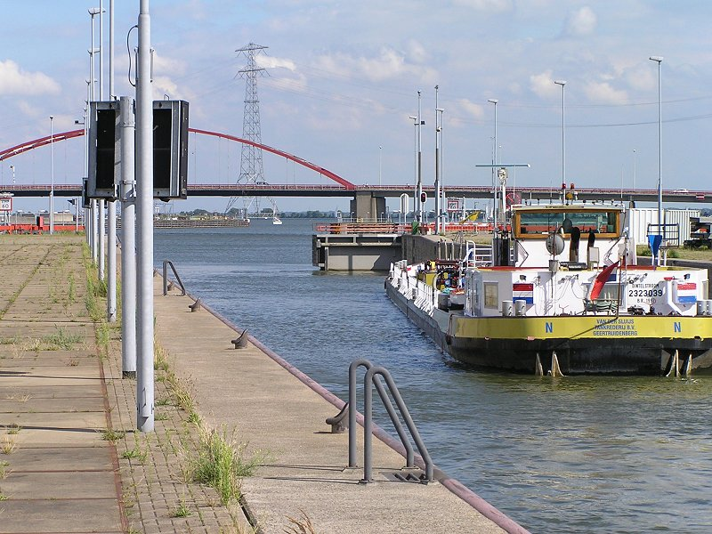 Een binnenvaartschip wacht tot de horizontaal schuivende sluisdeur geheel is geopend, zodat het de Willem-Alexandersluis uit kan varen richting Buiten-IJ. Foto juli 2005.